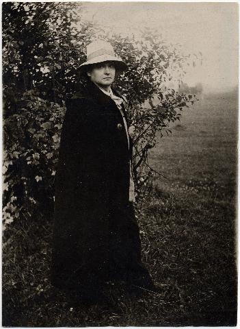 Photo de l'écrivain letton Vilis Plūdons (1874-1940) faite en 1915. Debout de trois quarts, portant un chapeau et une cape ( en noir et blanc 16,1 x 11,6 cm). Autour inconnu.